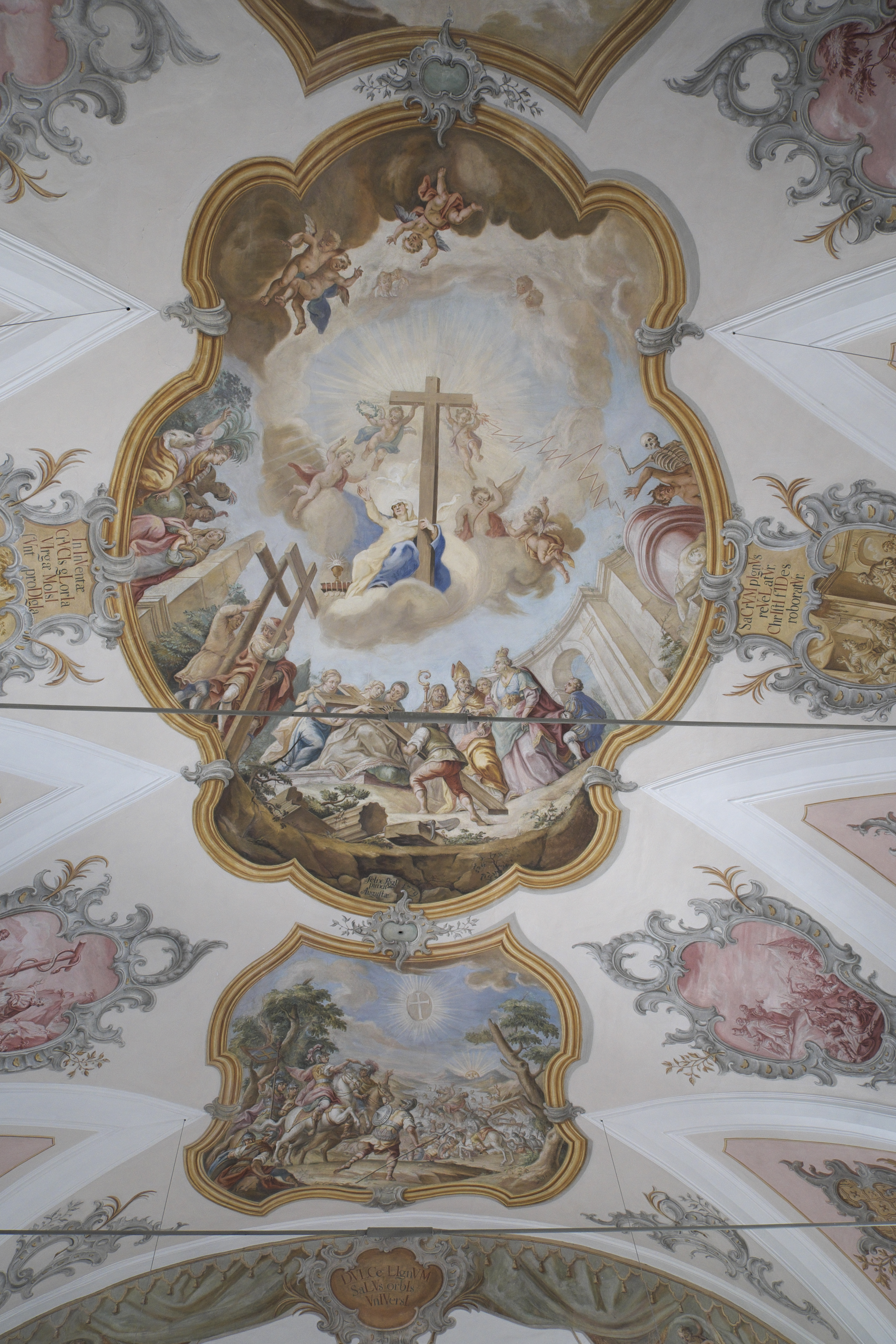 Katholische Pfarrkirche Heilig Kreuz in Schwabhausen bei Landsberg, einem Ortsteil von Weil (Oberbayern) im Landkreis Landsberg am Lech (Bayern/Deutschland), Fresken von Vitus Felix Rigl, von 1779; Darstellung im Langhaus: Kreuzesprobe durch die heilige Helena, Schlacht an der Milvischen Brücke